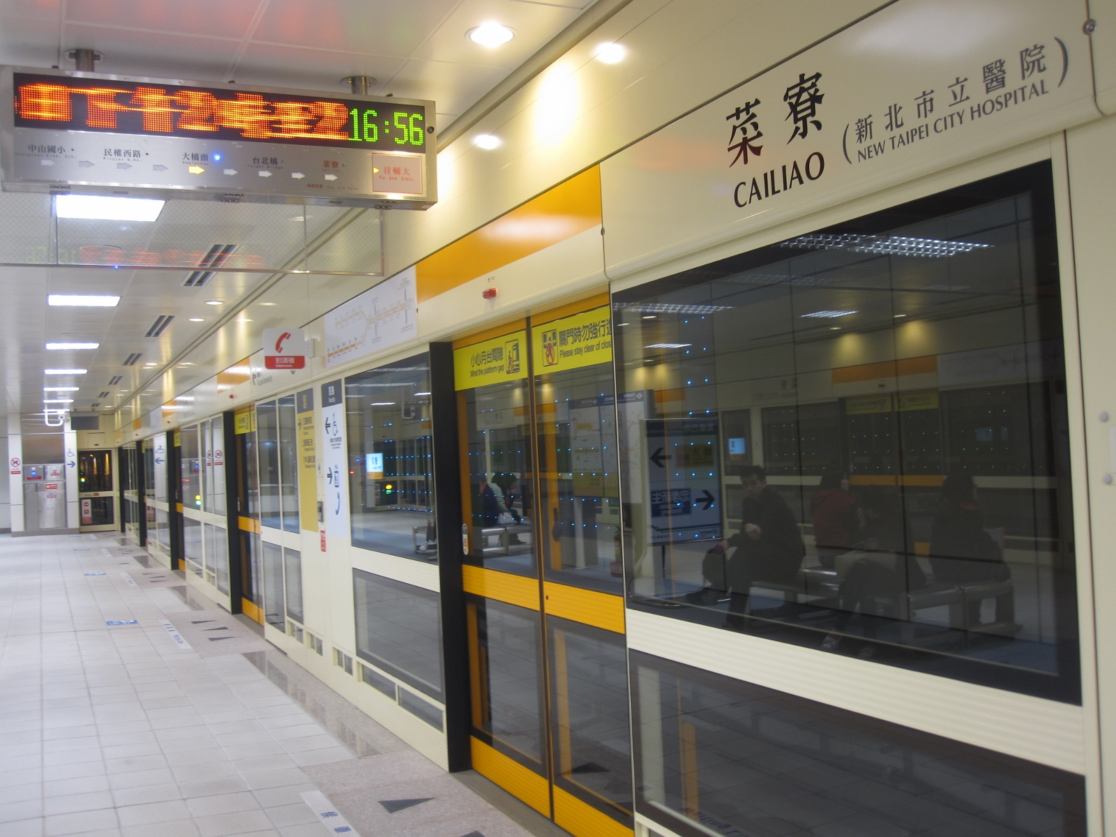 中文（台灣）: 台北捷運菜寮站第一月台。